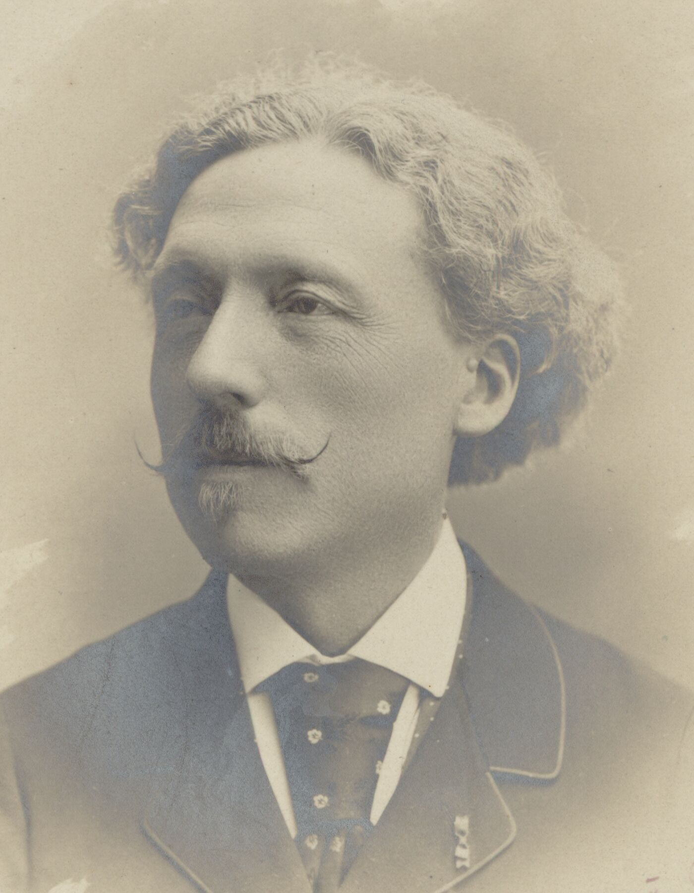 Louis-Joseph Diémer (1843-1919), French composer